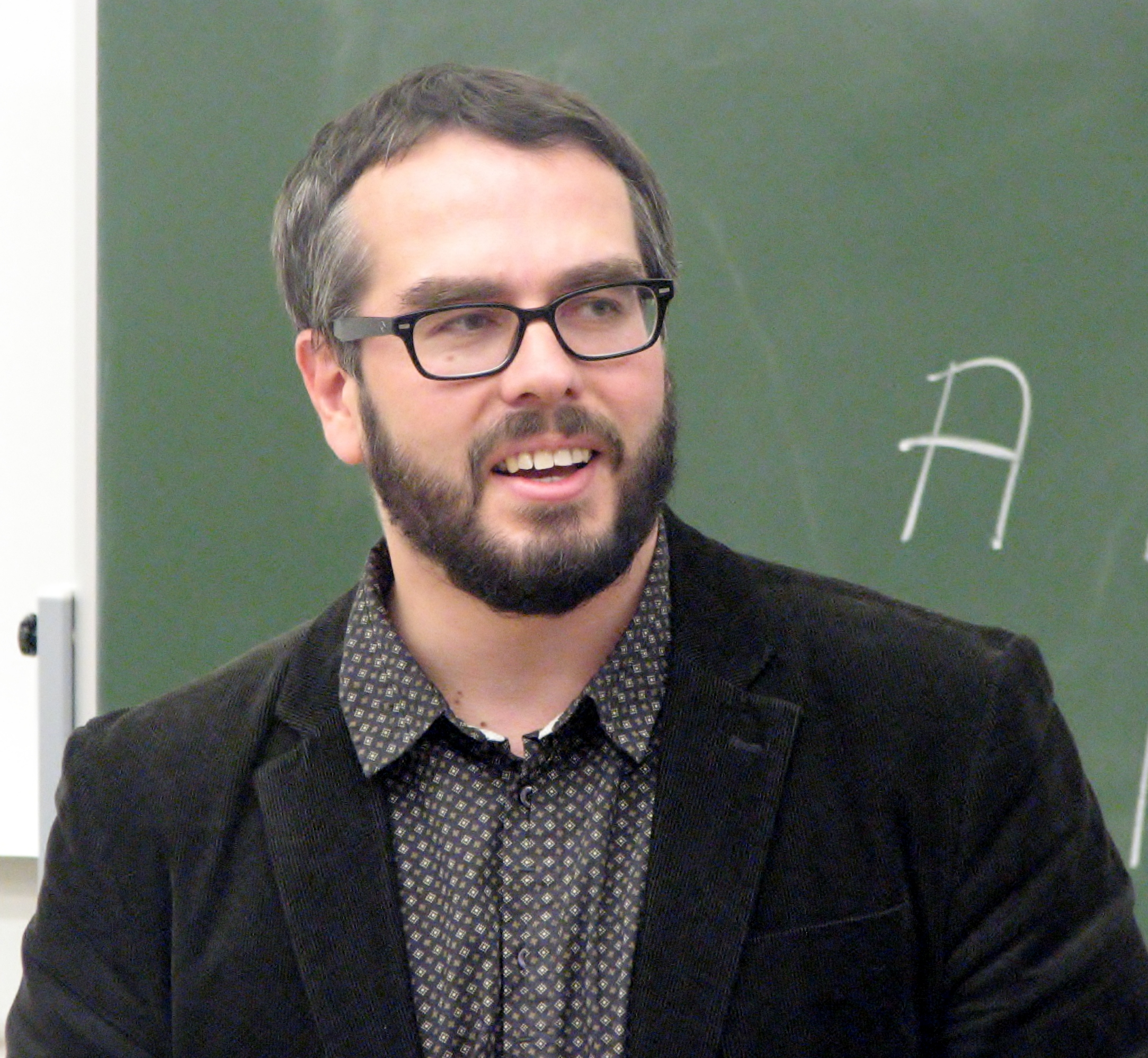 Marek Tamm esinemas Mihhail Lotmanile korraldatud sümpoosionil